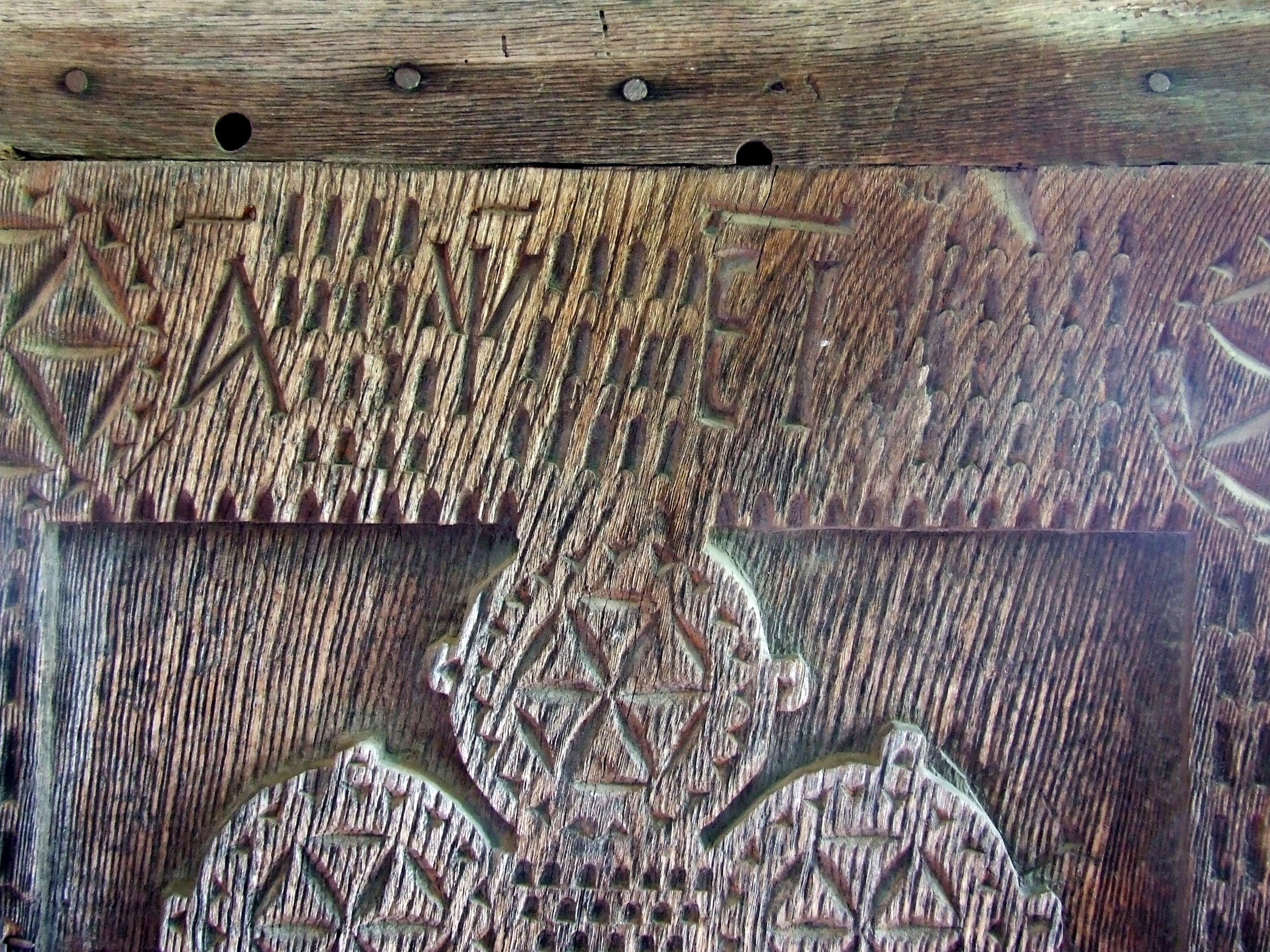 Biserica de lemn din Sumurducu. Inscripţia care datează biserica.